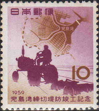 1959年に日本国郵政省が発行した「児島湖締切堤防竣工記念切手」